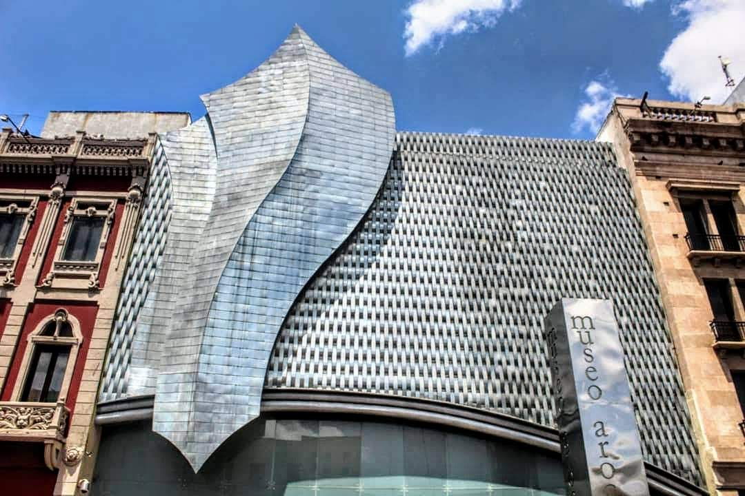 museo de torreon